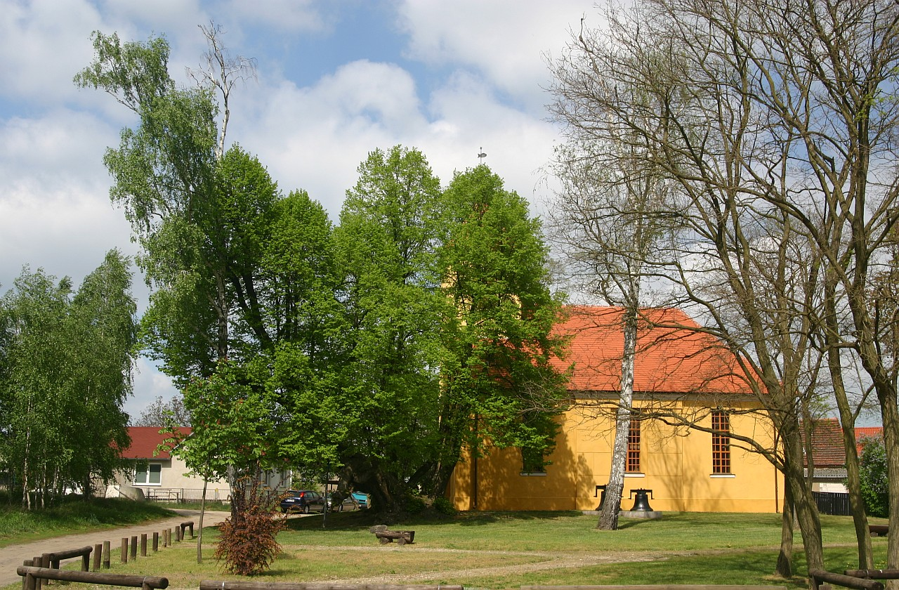 Wernsdorf: Dorfkirche und 500jährige Linde